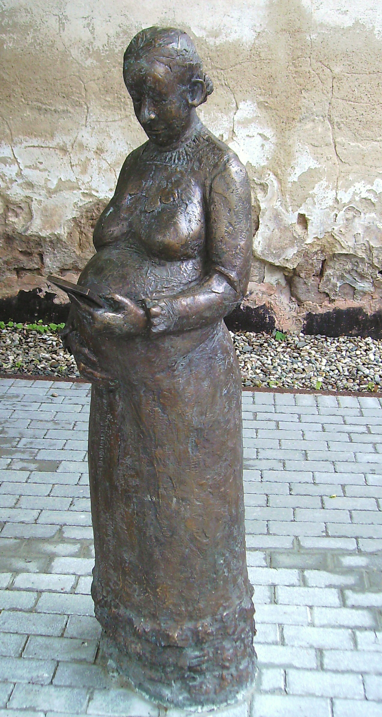 Bronzeplastik Hommage an Lenchen Demuth (Kurt Tassotti, 2012) von Helena (Lenchen) Demuth (Standort an der alten Stadtmauer, St. Wendel)